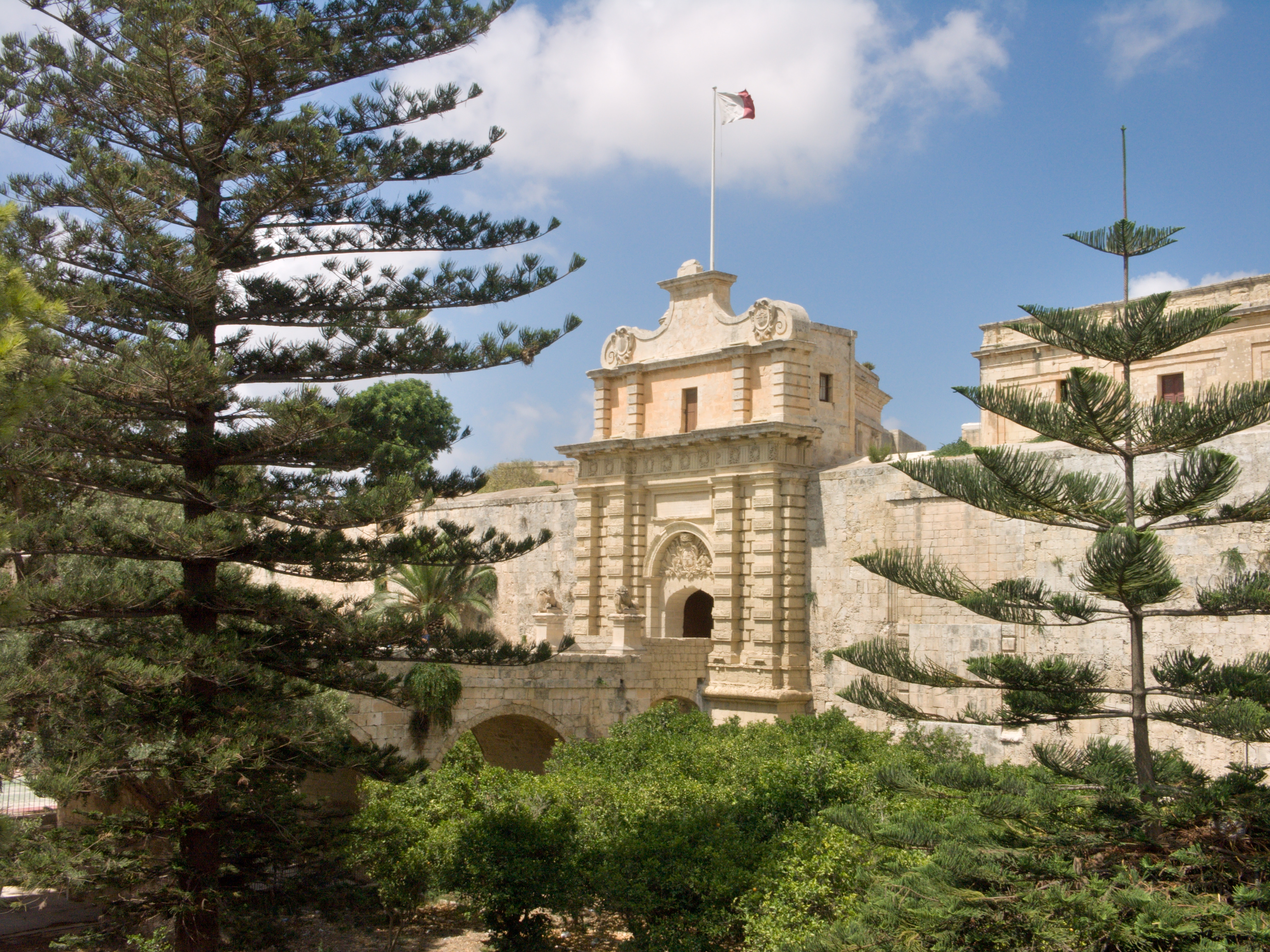 Porte de Mdina